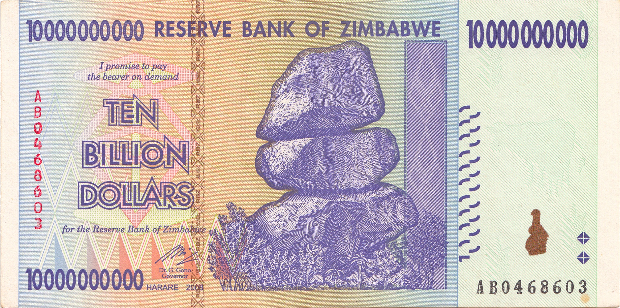 Banconota da 10 Miliardi di dollari dello Zimbabwe del 2008